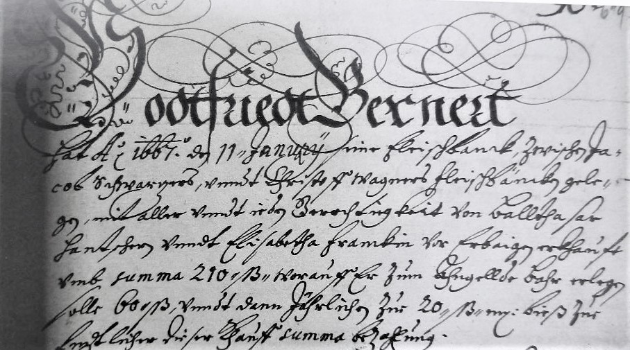 In der Seite von 1665 werden für eine Initiale G zwei Varianten geschrieben